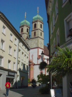 Bad Säckingen: Altstadt mit Münster